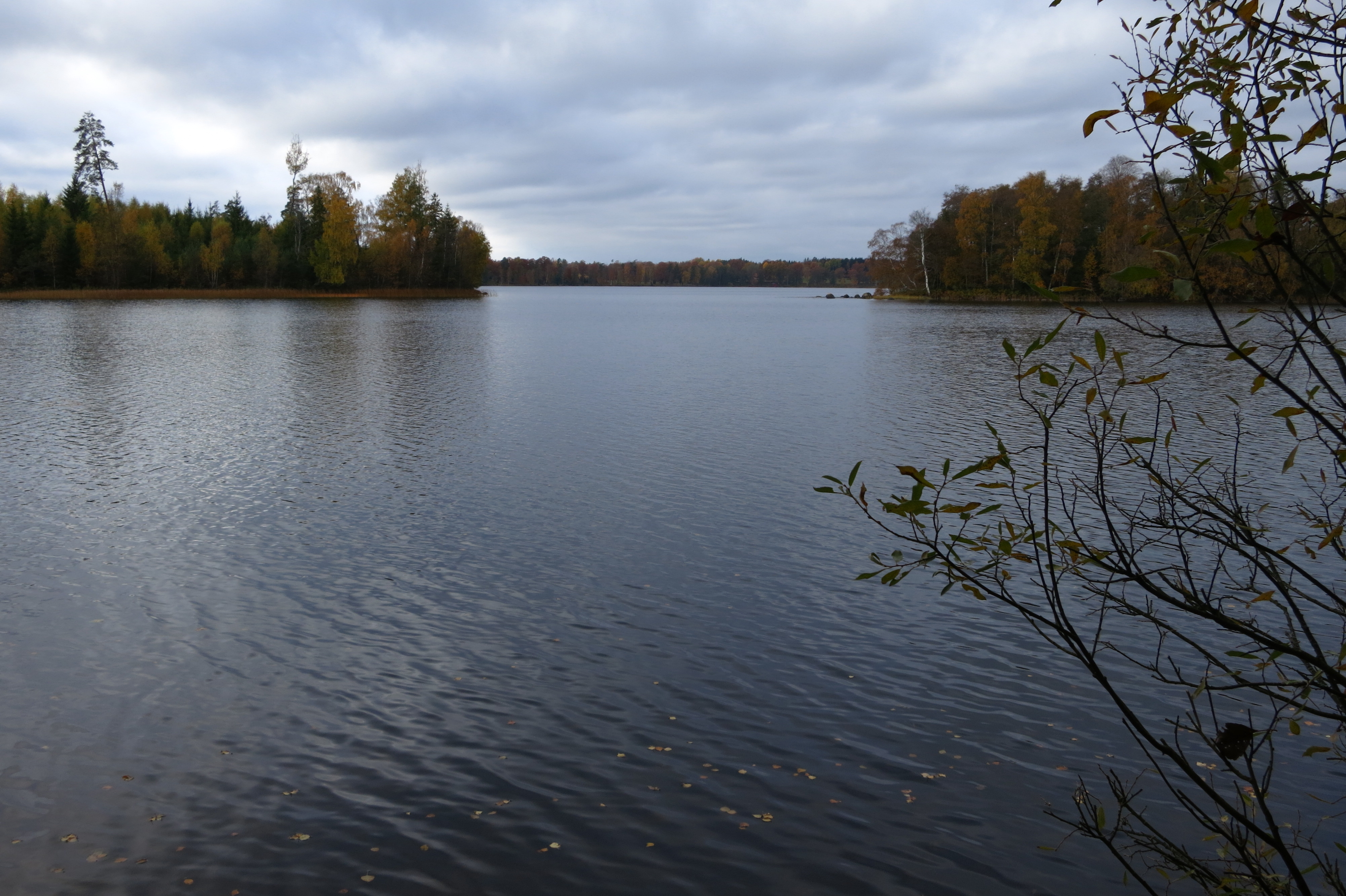 Sjön Flaken, Emmaboda kommun